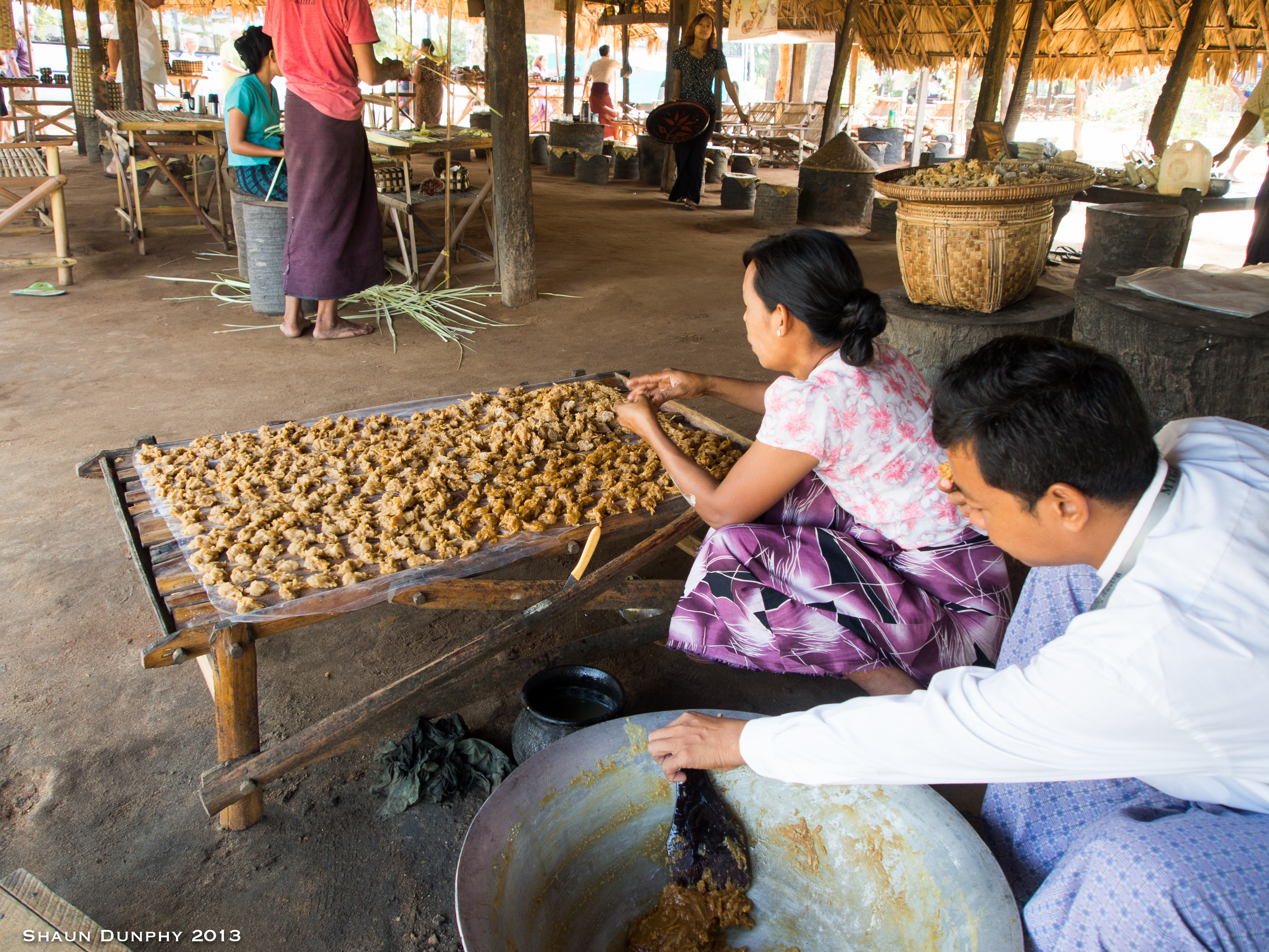 Making jaggery - a bit like Scottish tablet :)